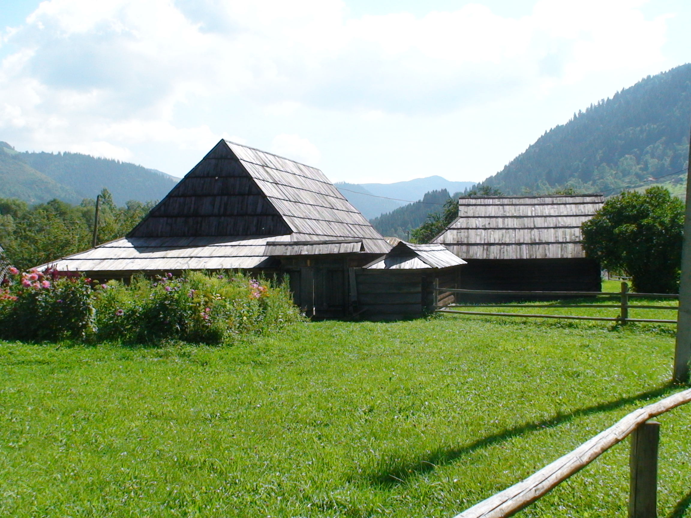 Гуцульский крестьянский дом - "гражда" в селе Криворивня в котором режиссер С.Параджанов снимал основные сюжетные события фильма "Тени забытых предков"